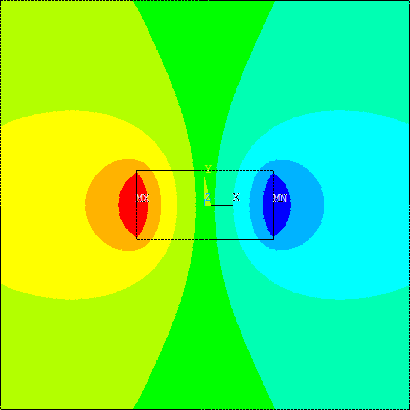 Pole magnetyczne wokół magnesu trwałego